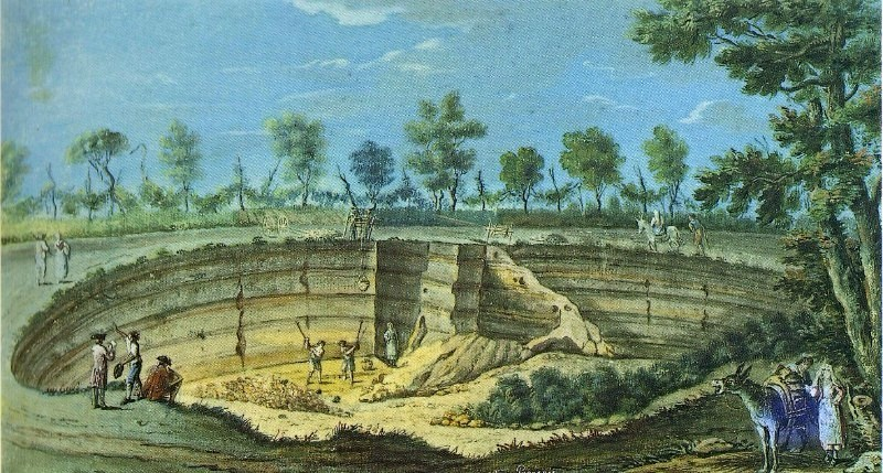 Pietro Fabris (attivo a Napoli dal 1756 al 1792) - «Cava di tufo ch’è nel podere di D. Benedetto Farina nel territorio di Casalnuovo, il quale tufo è lava che il Vesuvio nei tempi antichissimi versò liquida». Tempera su carta (gouache), mm 20 x 27. Collezione Alisio, Napoli. La spiccata affinità stilistica del dipinto con analoghe composizioni del Fabris realizzate per illustrare lo studio di sir William Hamilton "Campi Phlegraei" ha fatto supporre a Nicola Spinosa che la gouache in oggetto potesse essere originariamente destinata all’illustrazione del volume.